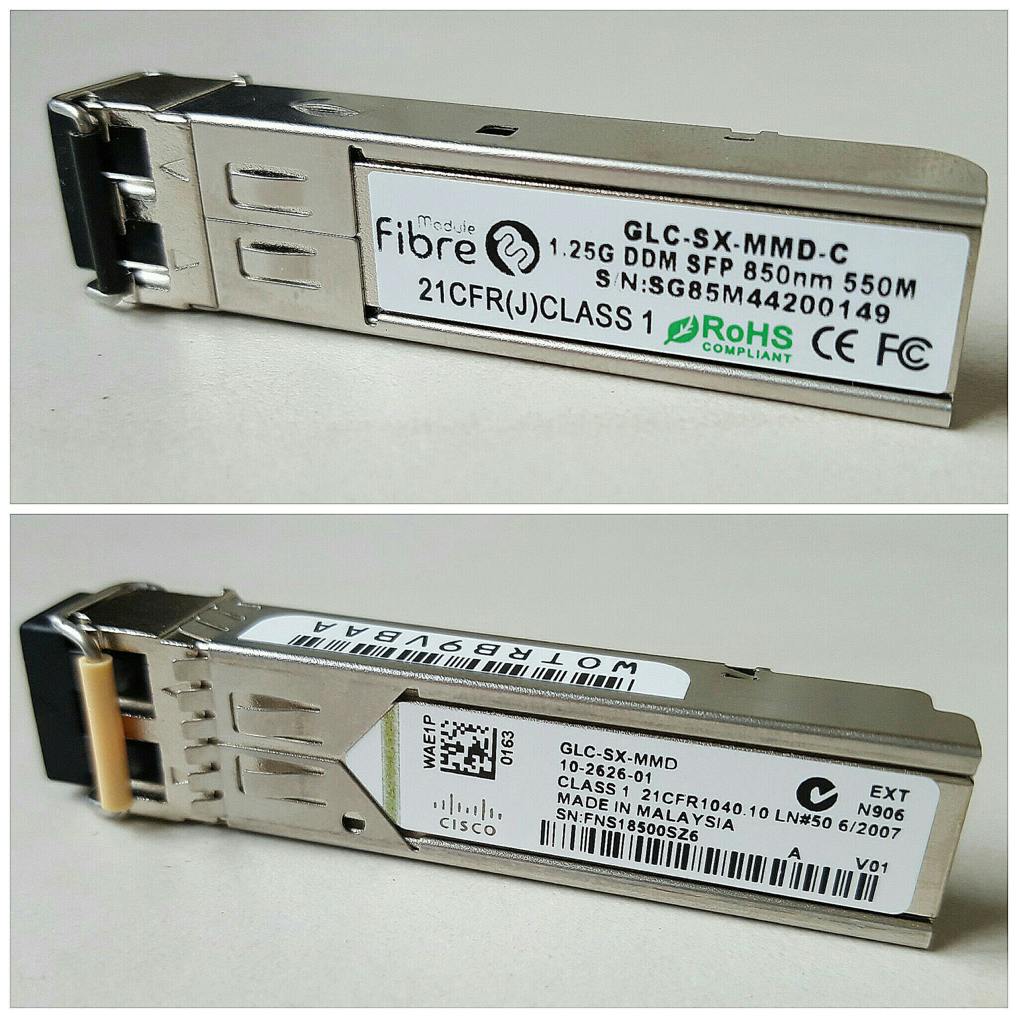 SFP